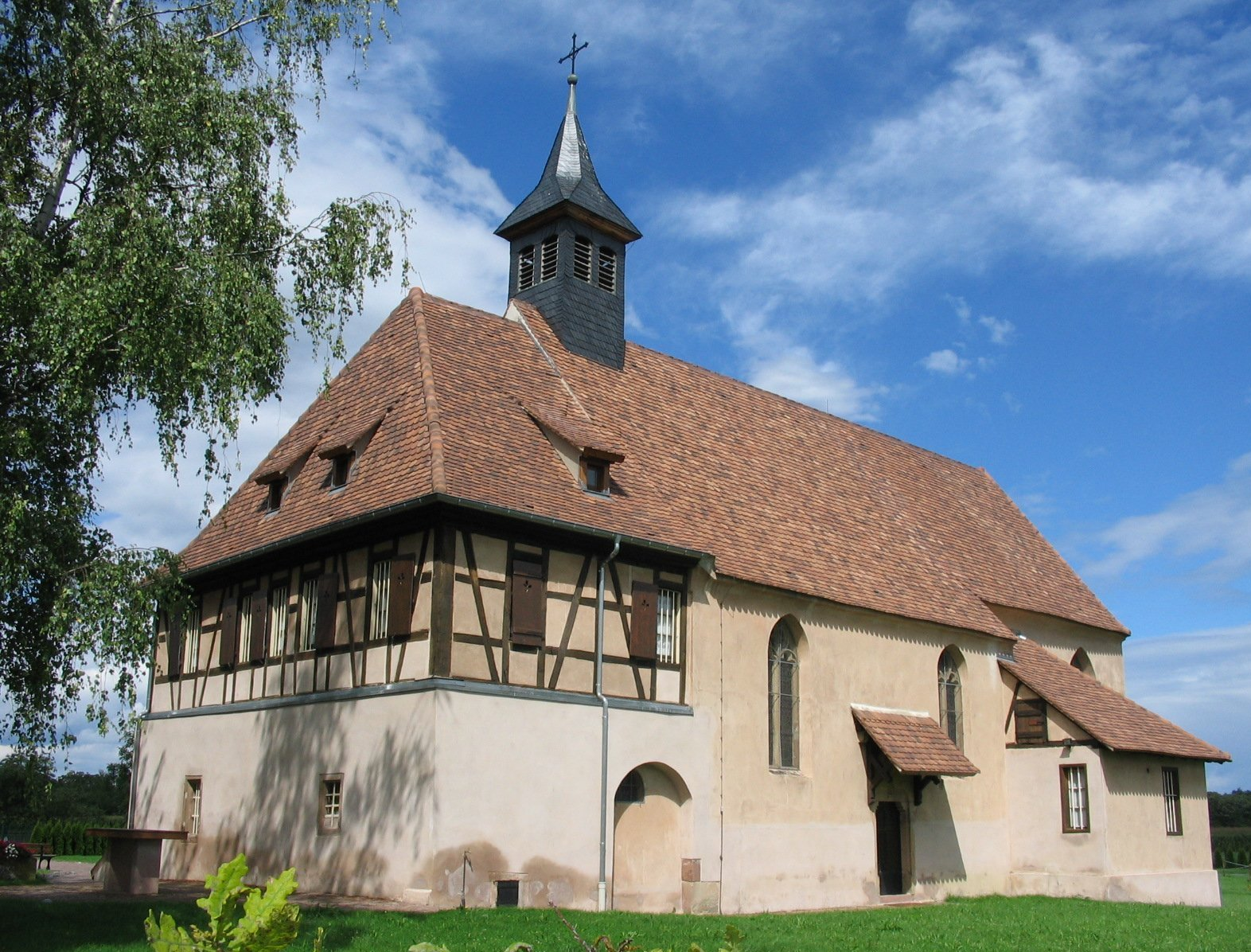 Chapelle Notre-Dame-du-Chêne à Plobsheim XIVe siècle. Vue extérieure